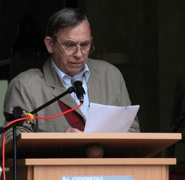 Gerd Fesser bei der Apoldaer Bürgerlesung verbrannter Dichter